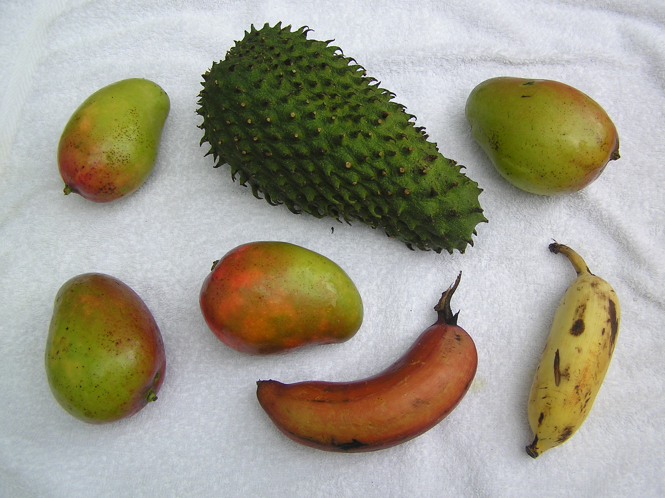 Fruits des Seychelles